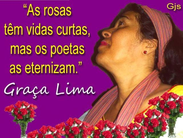 Graça Lima, veja uma frase dela muito linda!